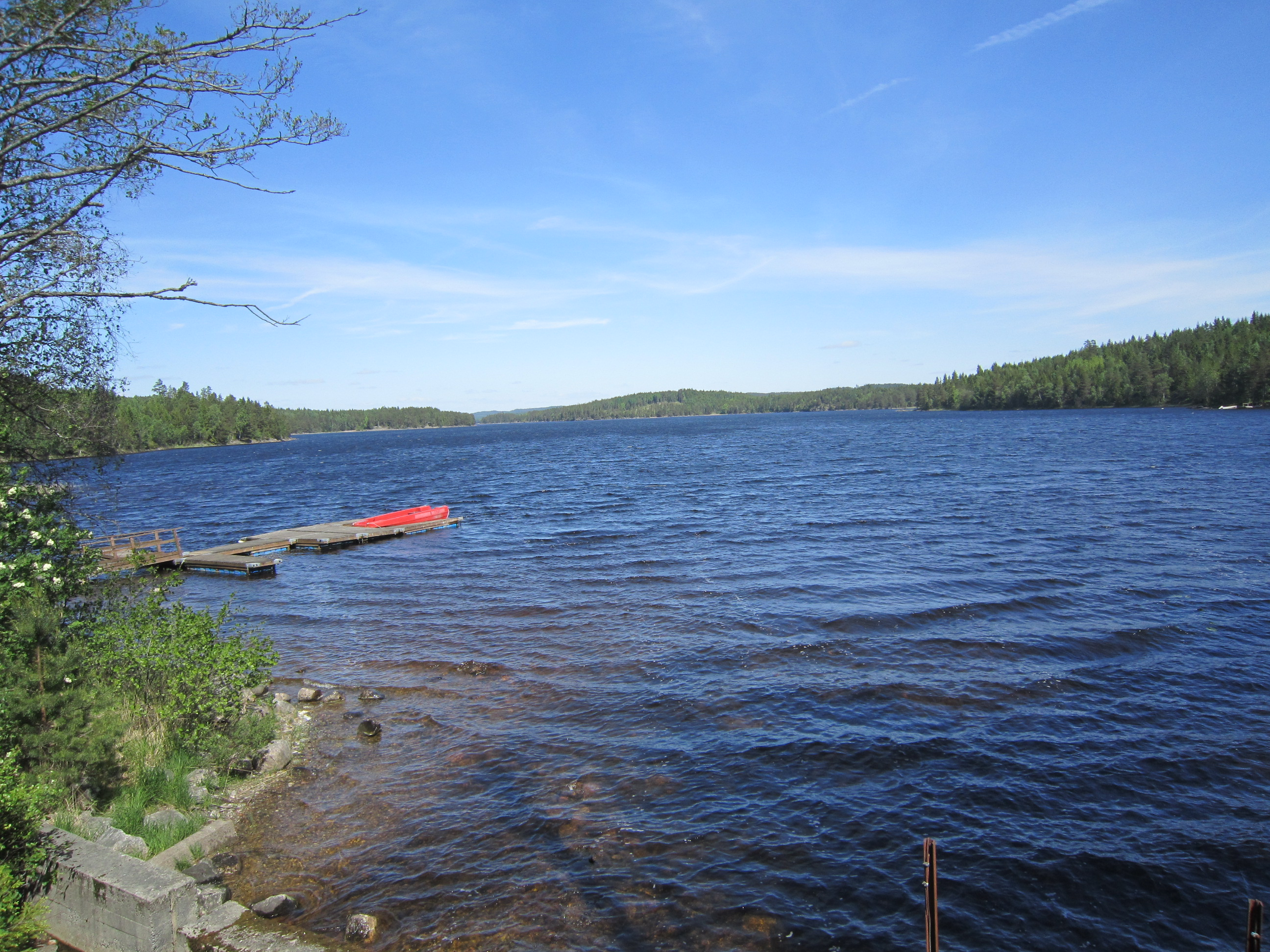 Ørsjøen ved Prestebakke